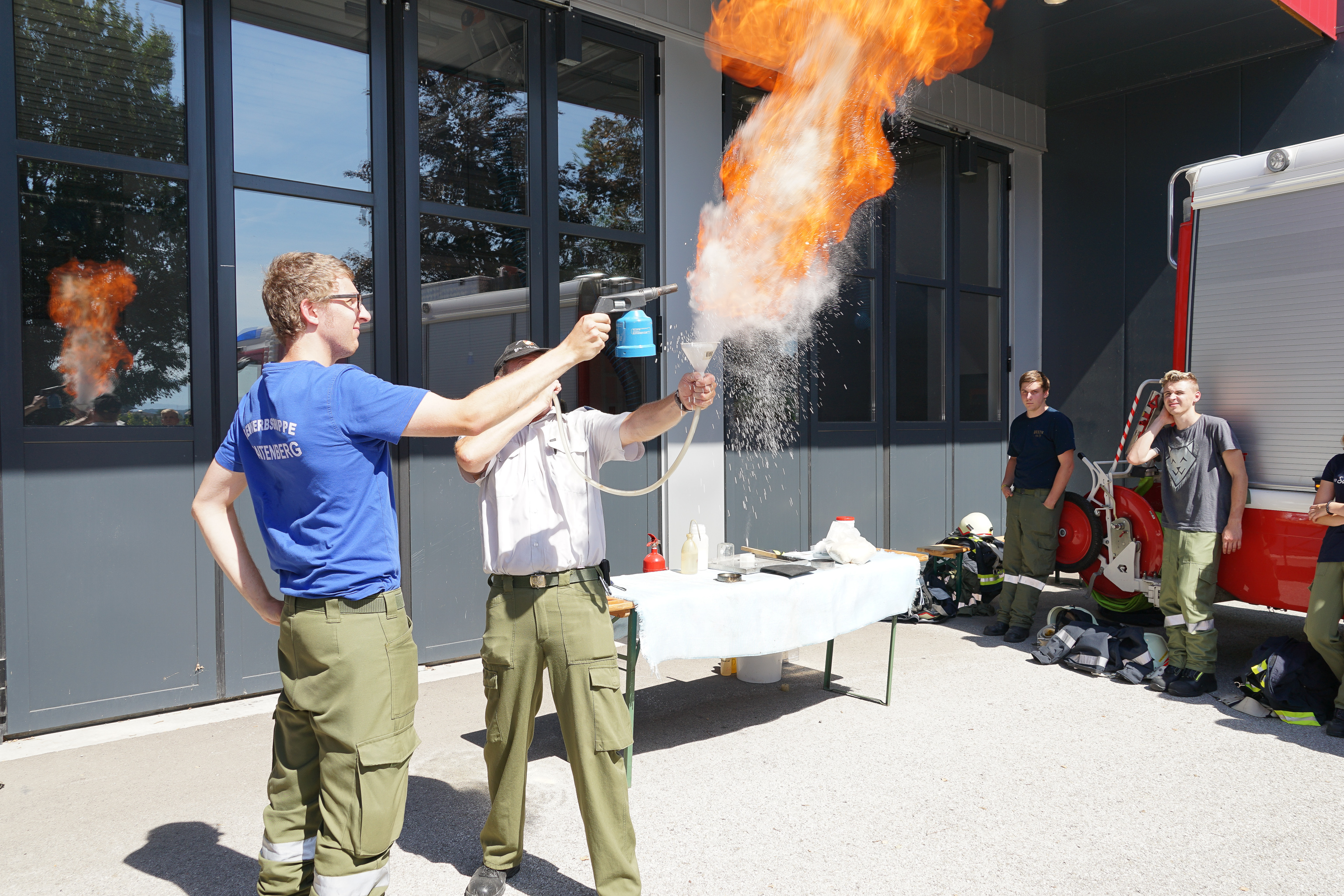 Brennbarkeitsversuche mit Gasbrenner und eingeblasenes Pulver (vermutlich Mehl) - Grundlehrgang für den Bezirk Vöcklabruck bei der Betriebsfeuerwehr Energie AG Timelkam